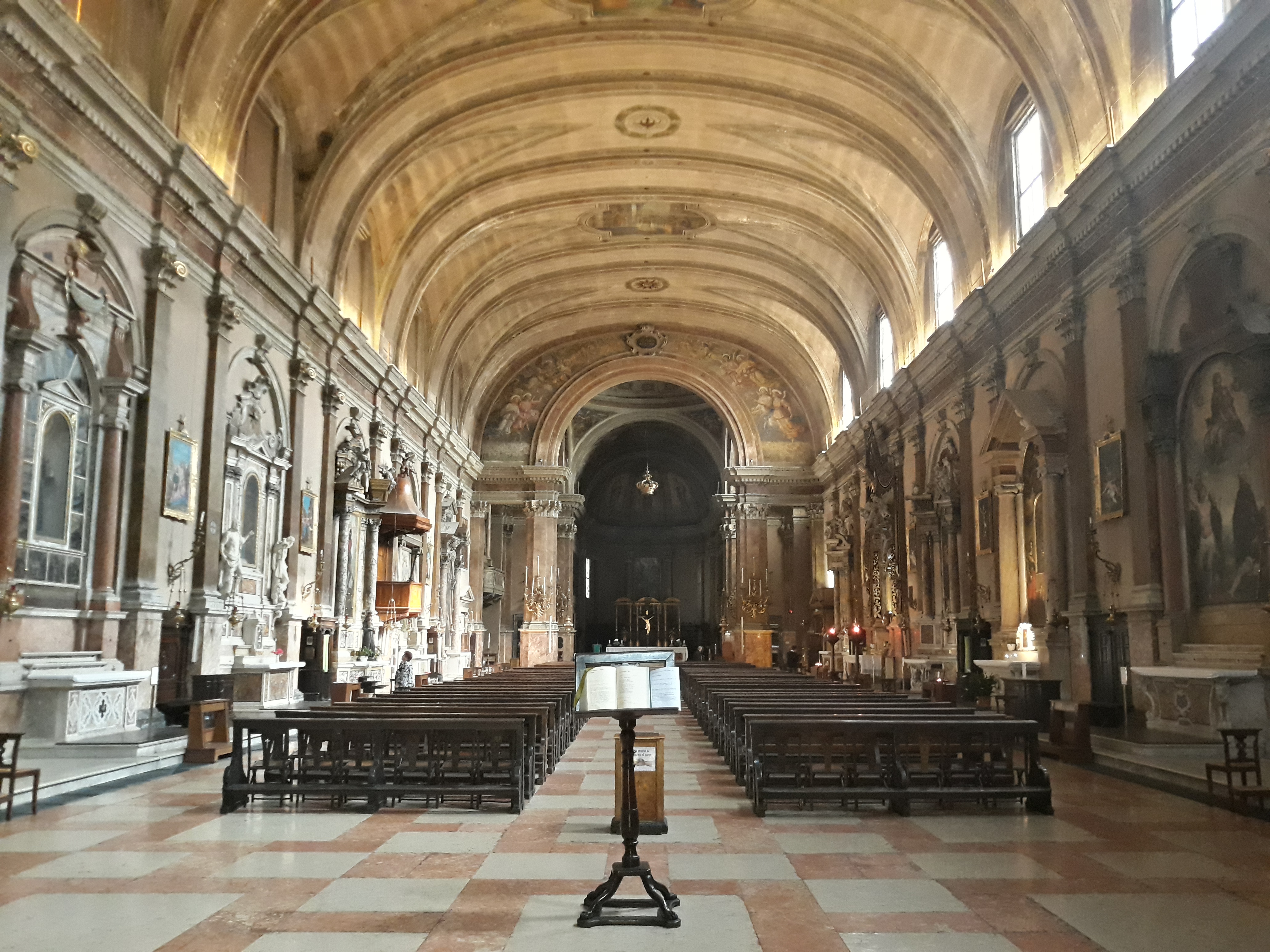 Interno della chiesa di Sant'Eufemia a Verona